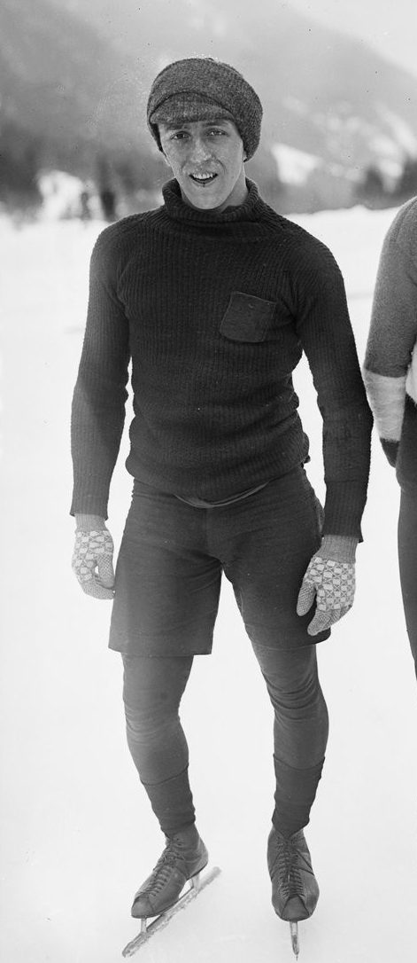 Quaglia [à d.], De Ridder [1er et 2e du 1500 mètres, patinage de vitesse, 25-1-22, à Chamonix] : [photographie de presse] / [Agence Rol]